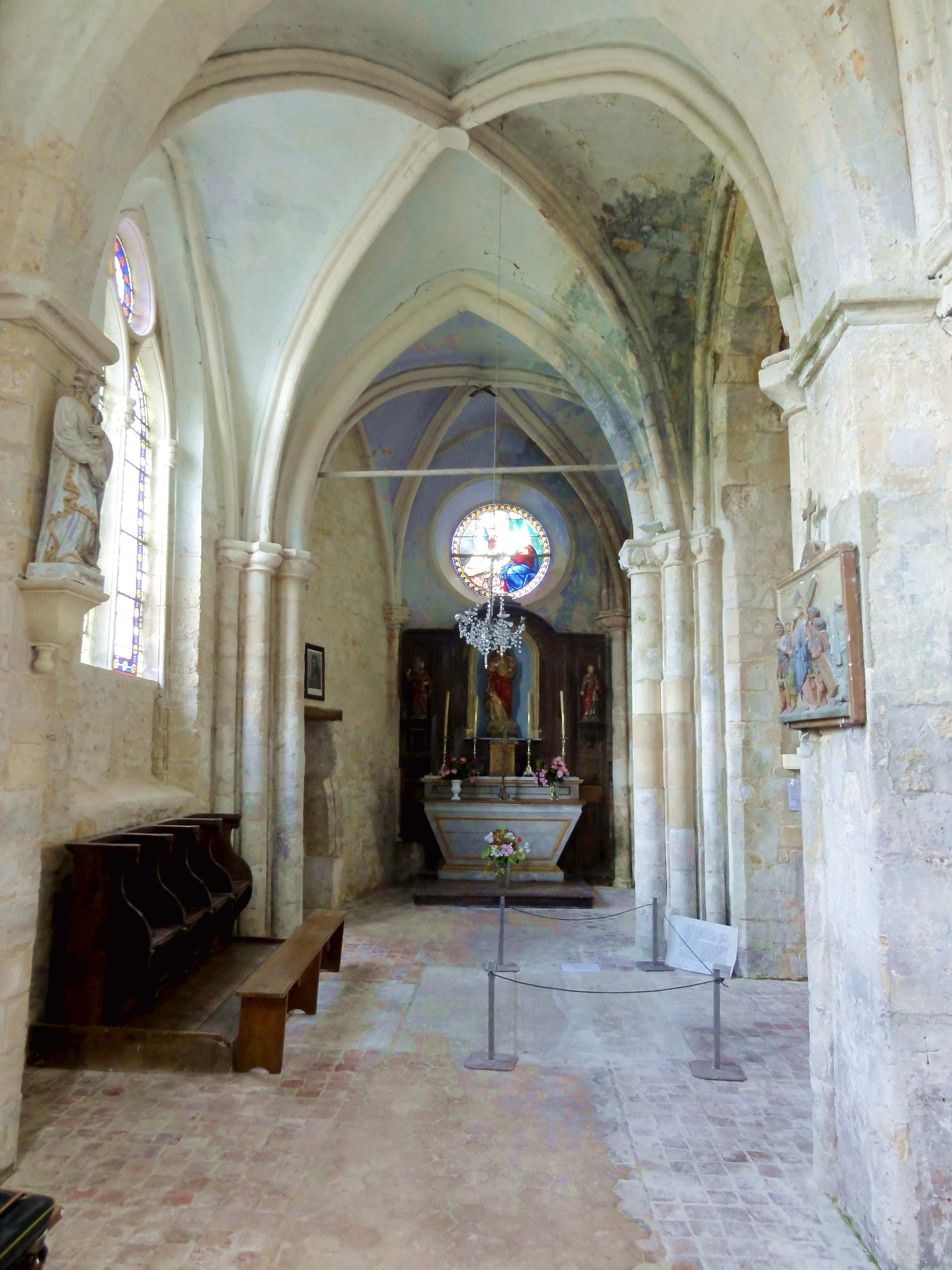 Intérieur de l'église - voir titre.